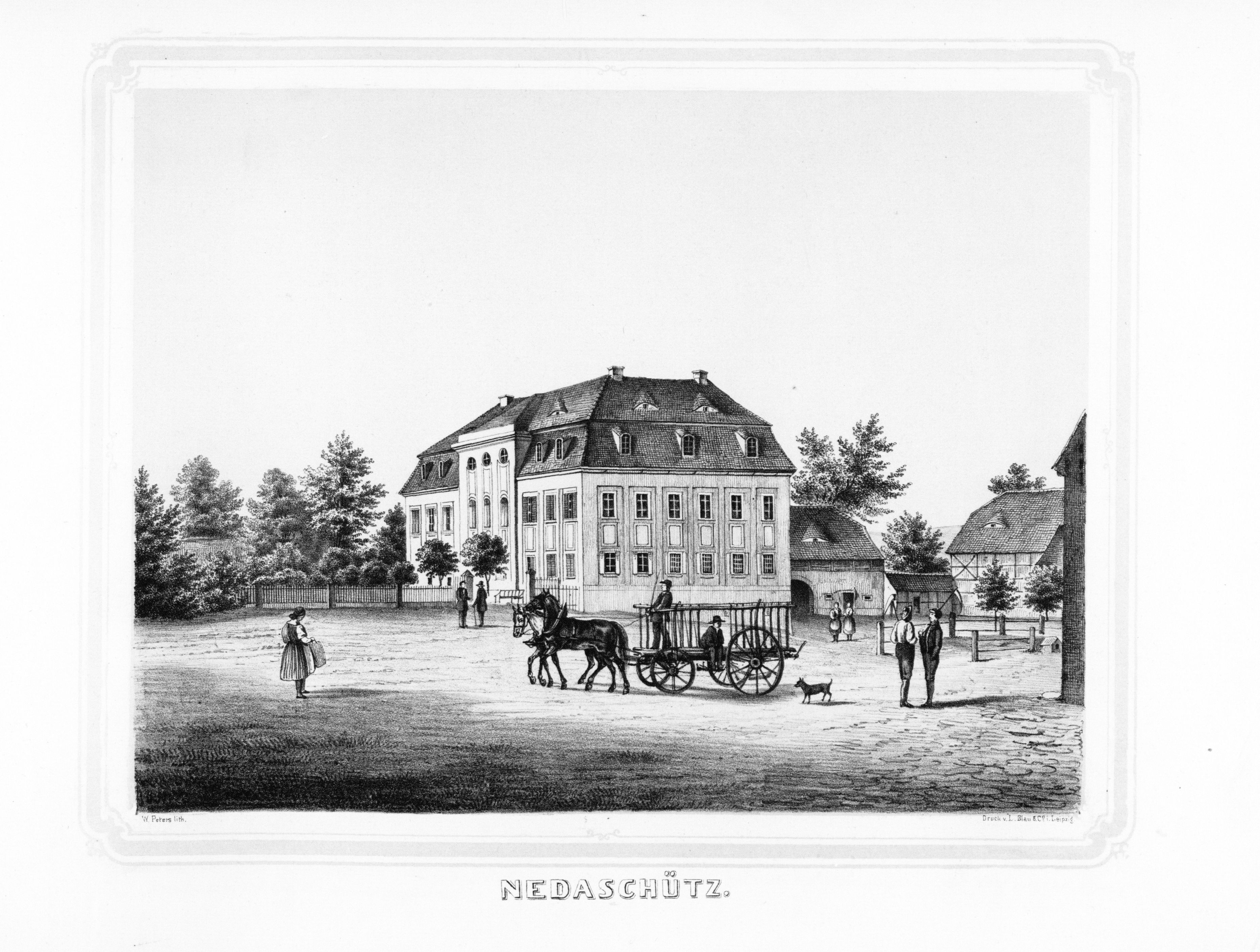 Nedaschütz aus: Album der Rittergüter und Schlösser im Königreiche Sachsen Markgrafenthum Oberlausitz Section: III